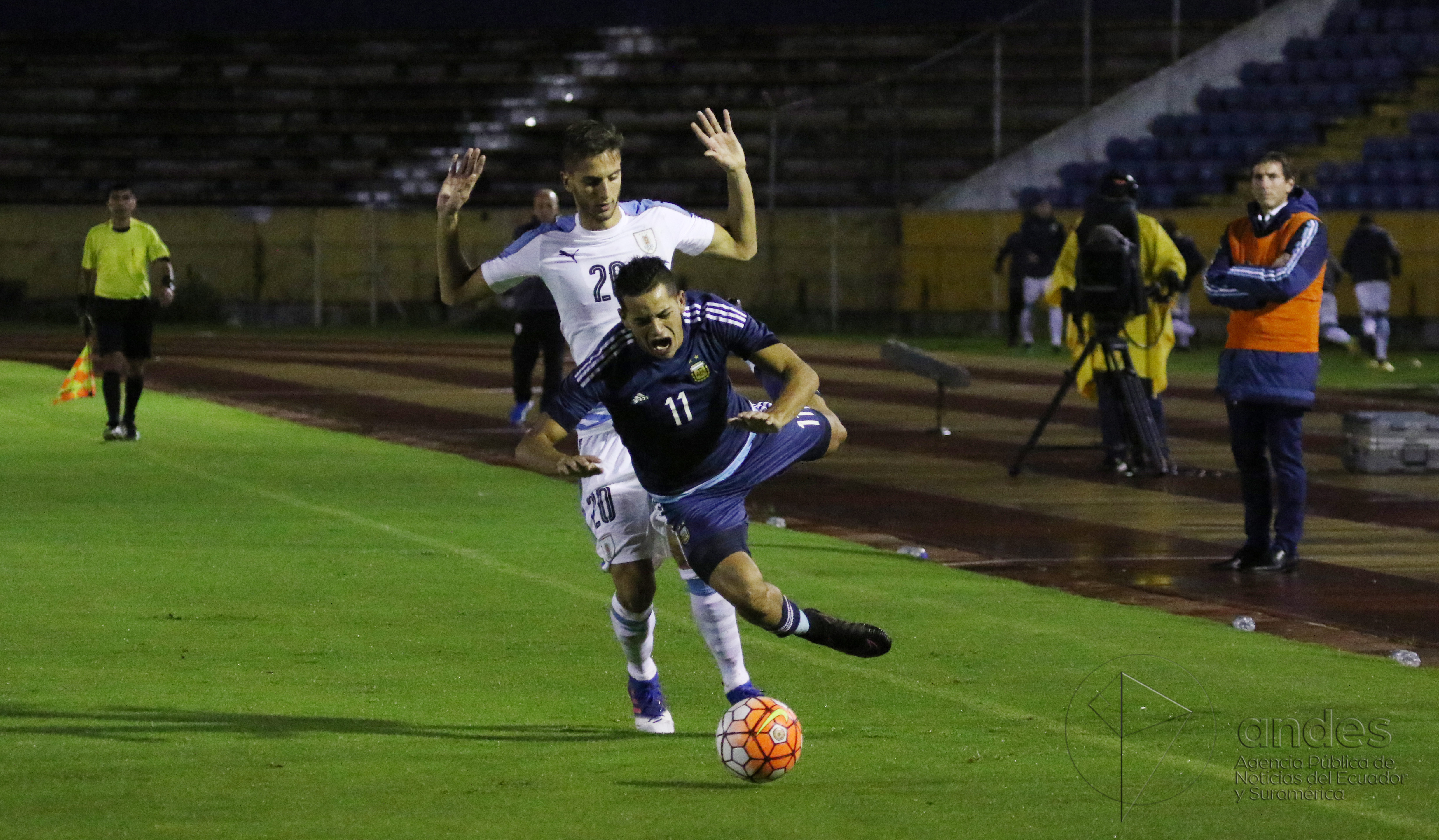 ARGENTINA URUGUAY 4 MAV